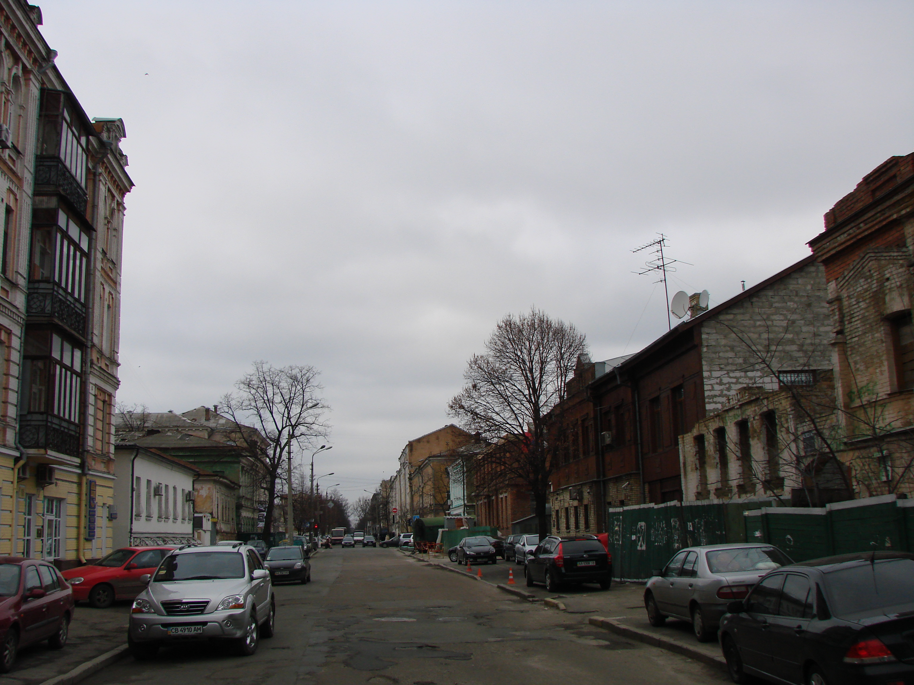 вулиця Волоська